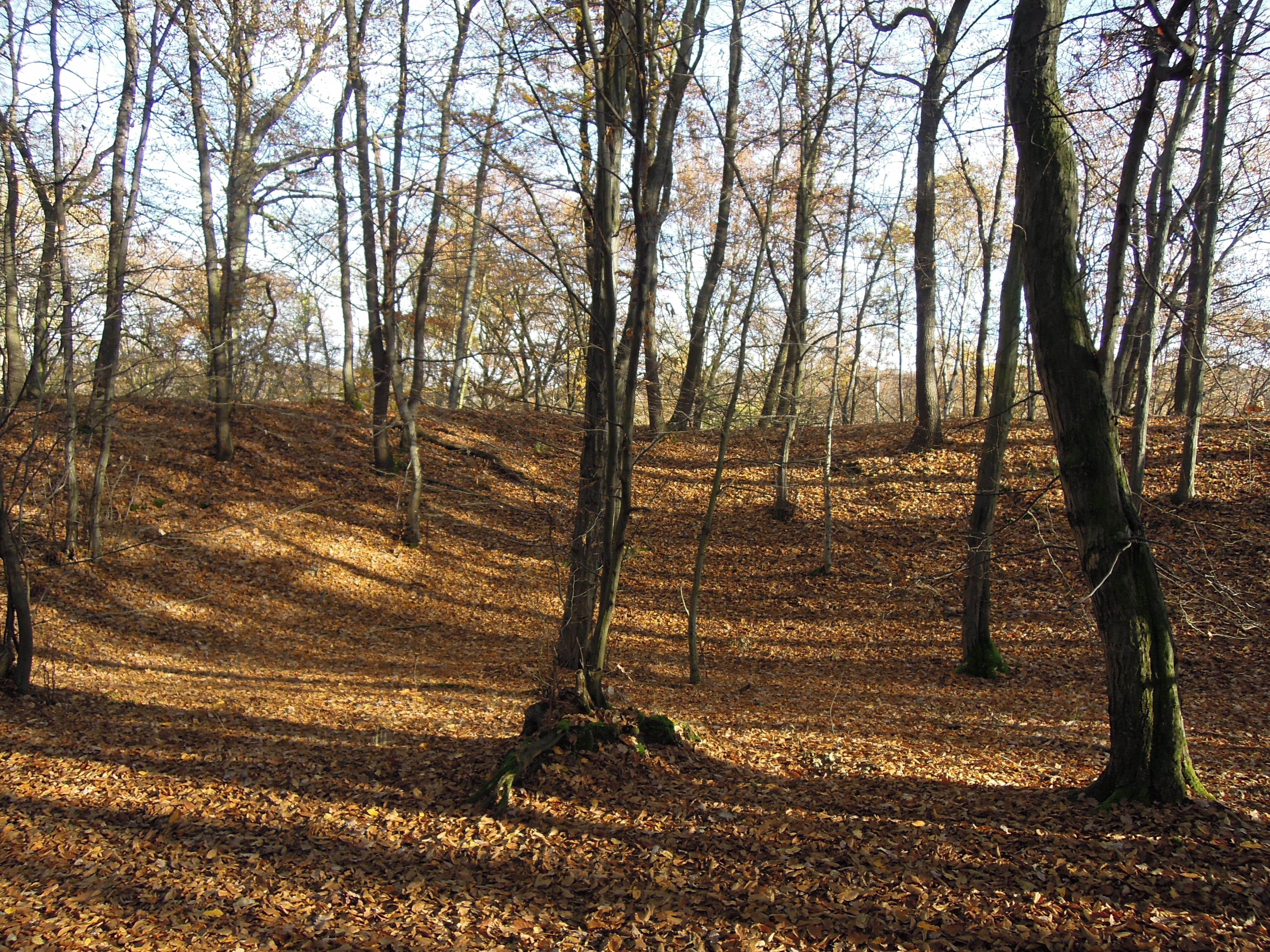 zbytky valu, přírodní rezervace Šance